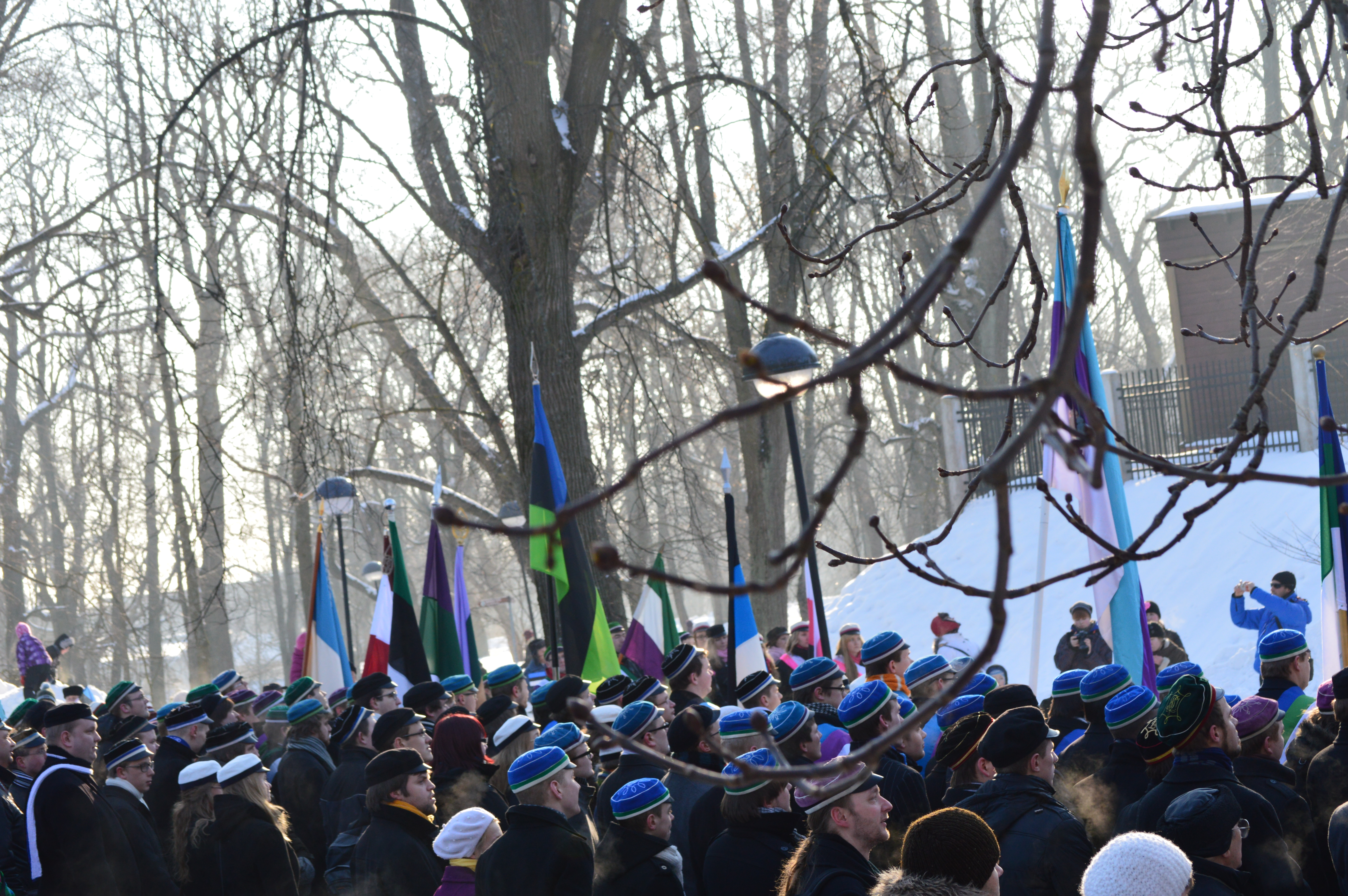 Vabariigi aastapäev Tartu Tähetorni juures